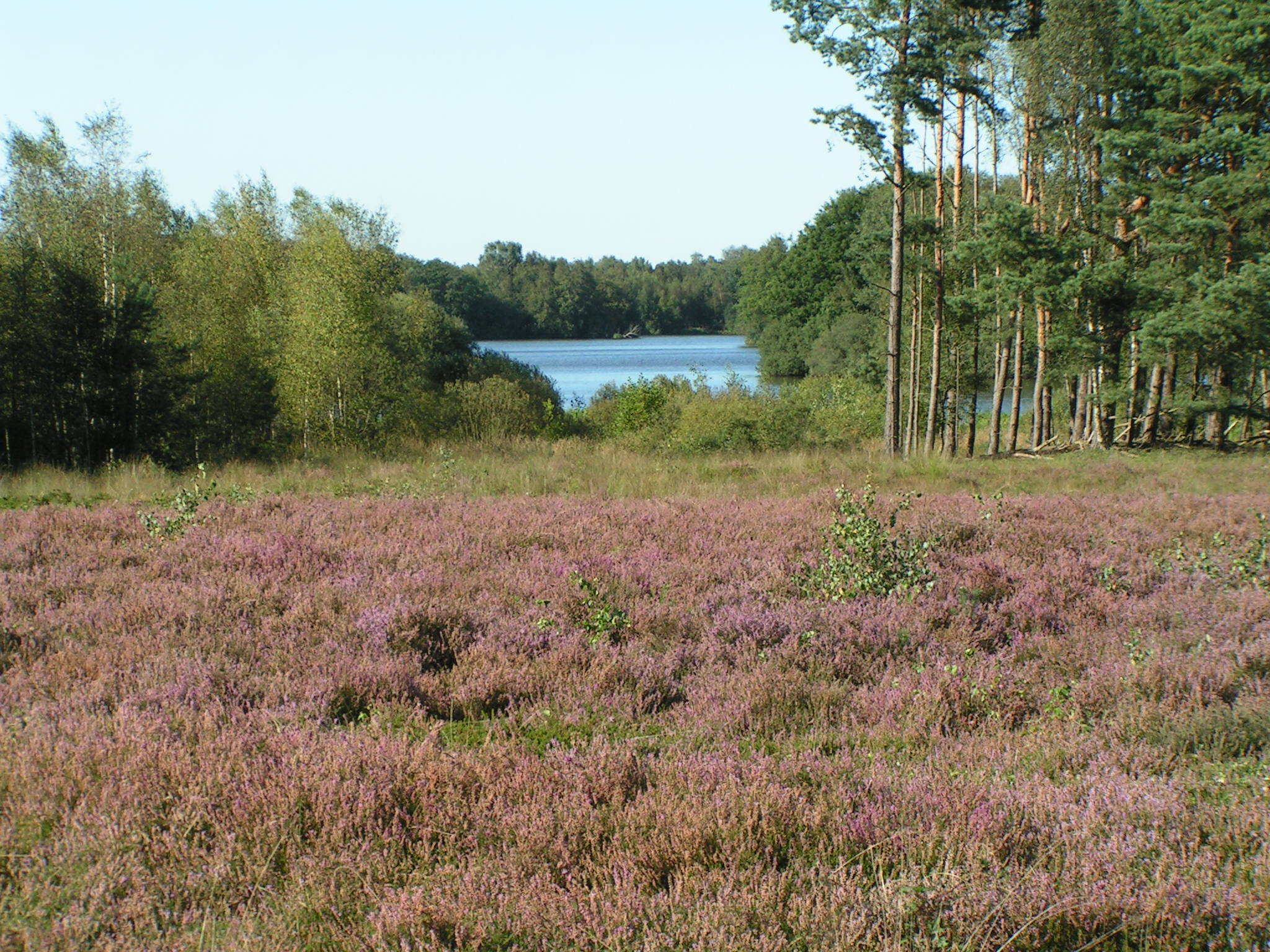 Heideblüte am Westufer der Thülsfelder Talsperre; Naturschutzgebiet „Talsperre Thülsfeld“